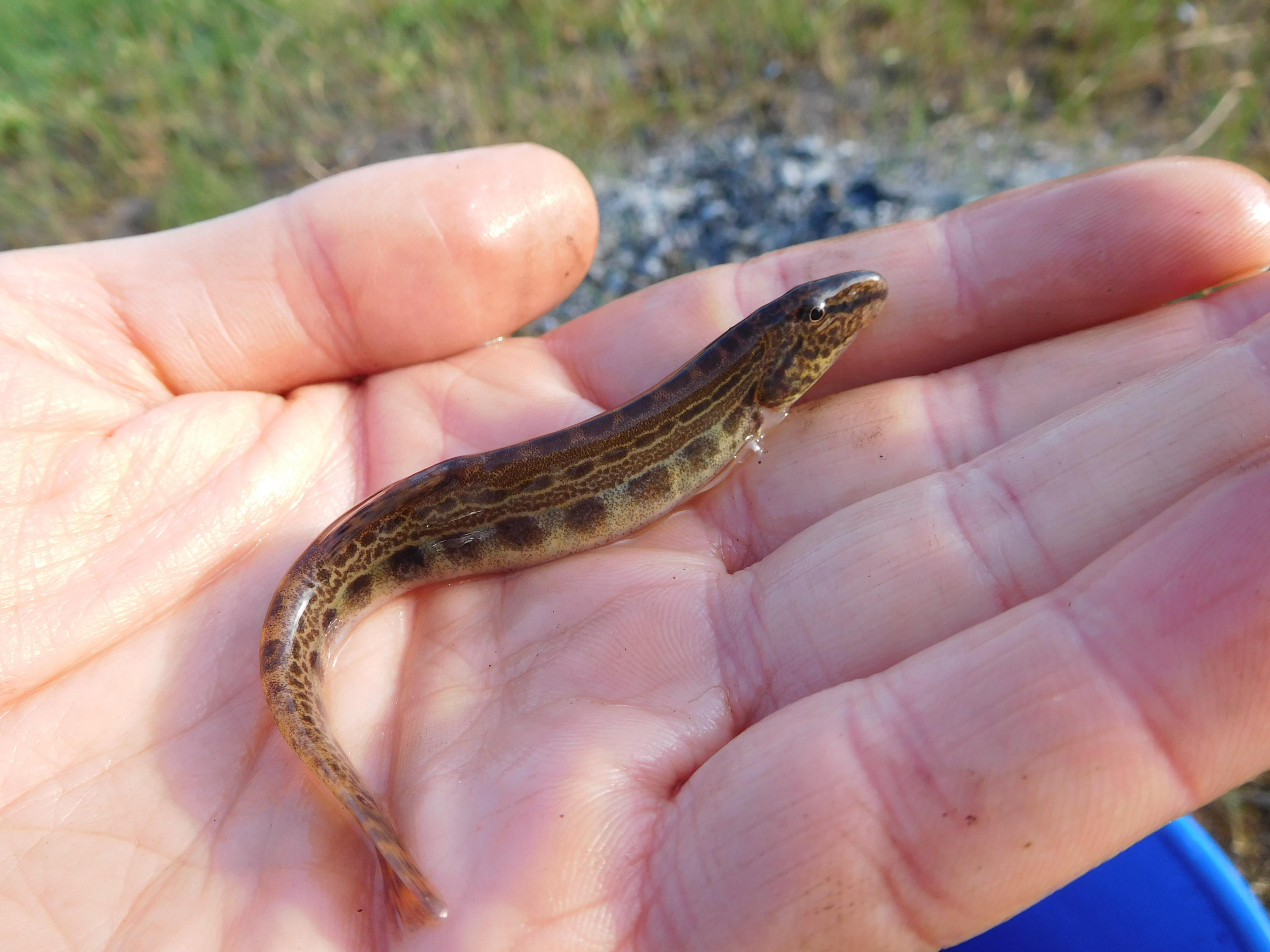 Щипавка кримська (Cobitis taurica) впіймана у Дніпровському лимані.